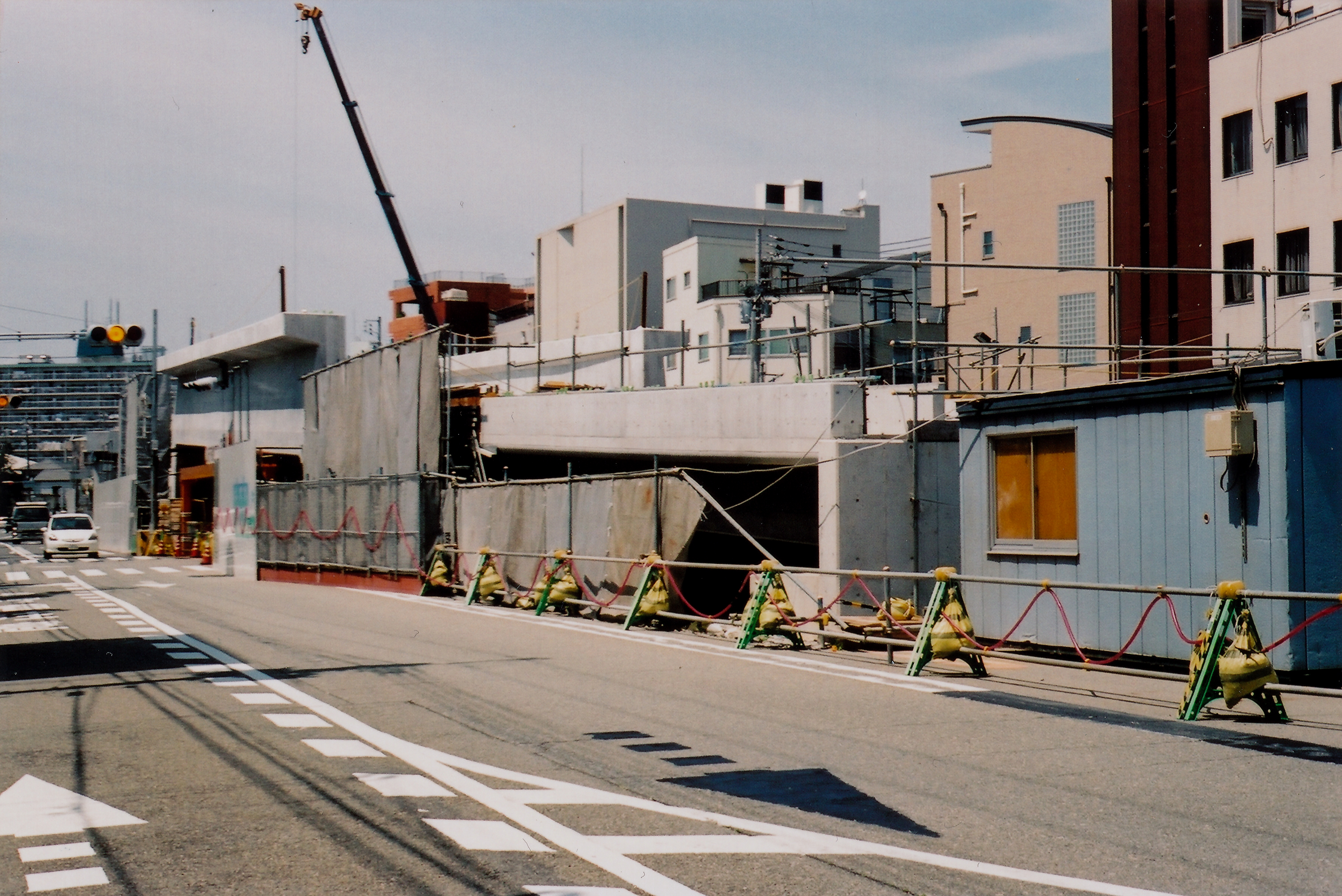 高架工事中の阪神なんば線 大阪市西区九条南３丁目付近。2007年撮影。